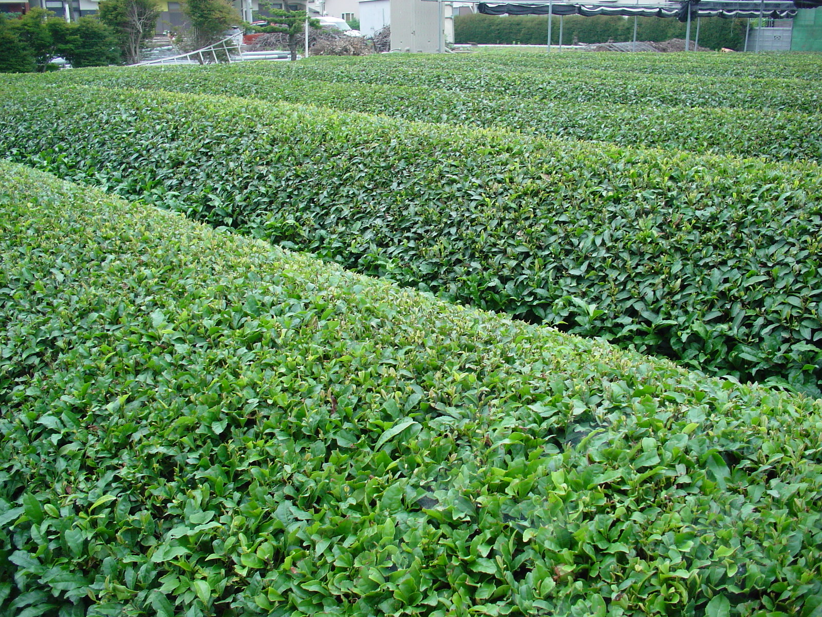 Champs de thé après la récolte. Saitama (Japon) Cliché personnel. Ruizo